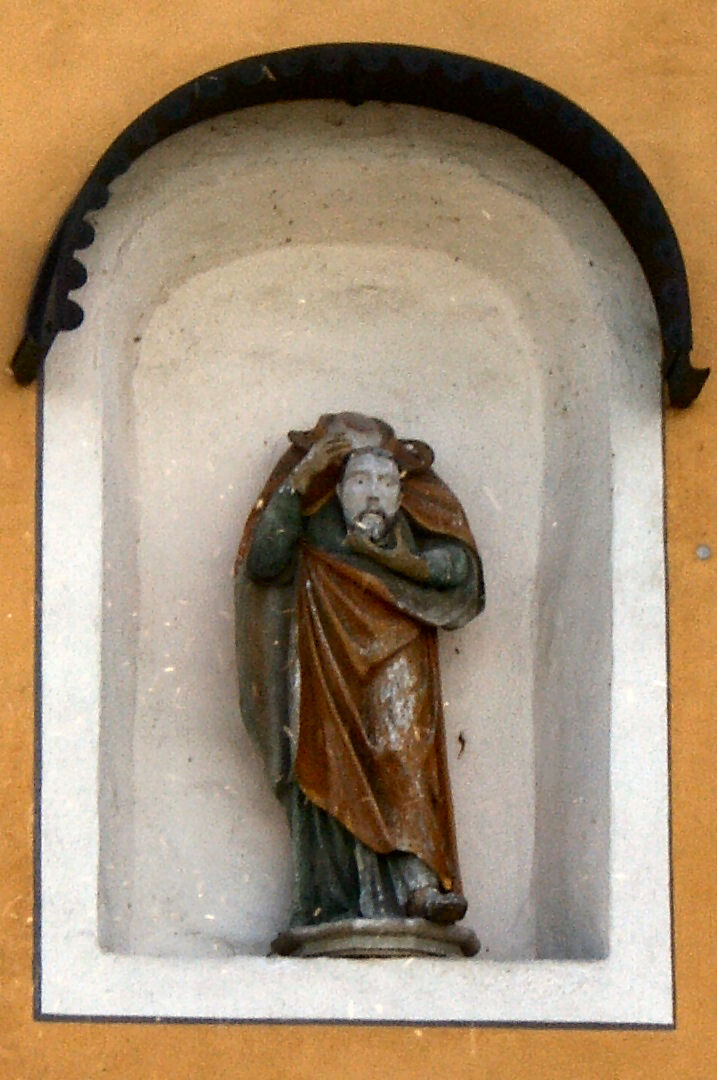 Darstellung von St. Alban am Ostgibel der Kirche St. Alban bei Dießen am Ammersee